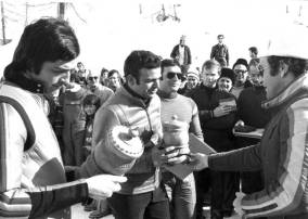 Cervinia: Canelli e Soravia premiati con la Grolla per la miglior spinta (campionati europei junior 1974)